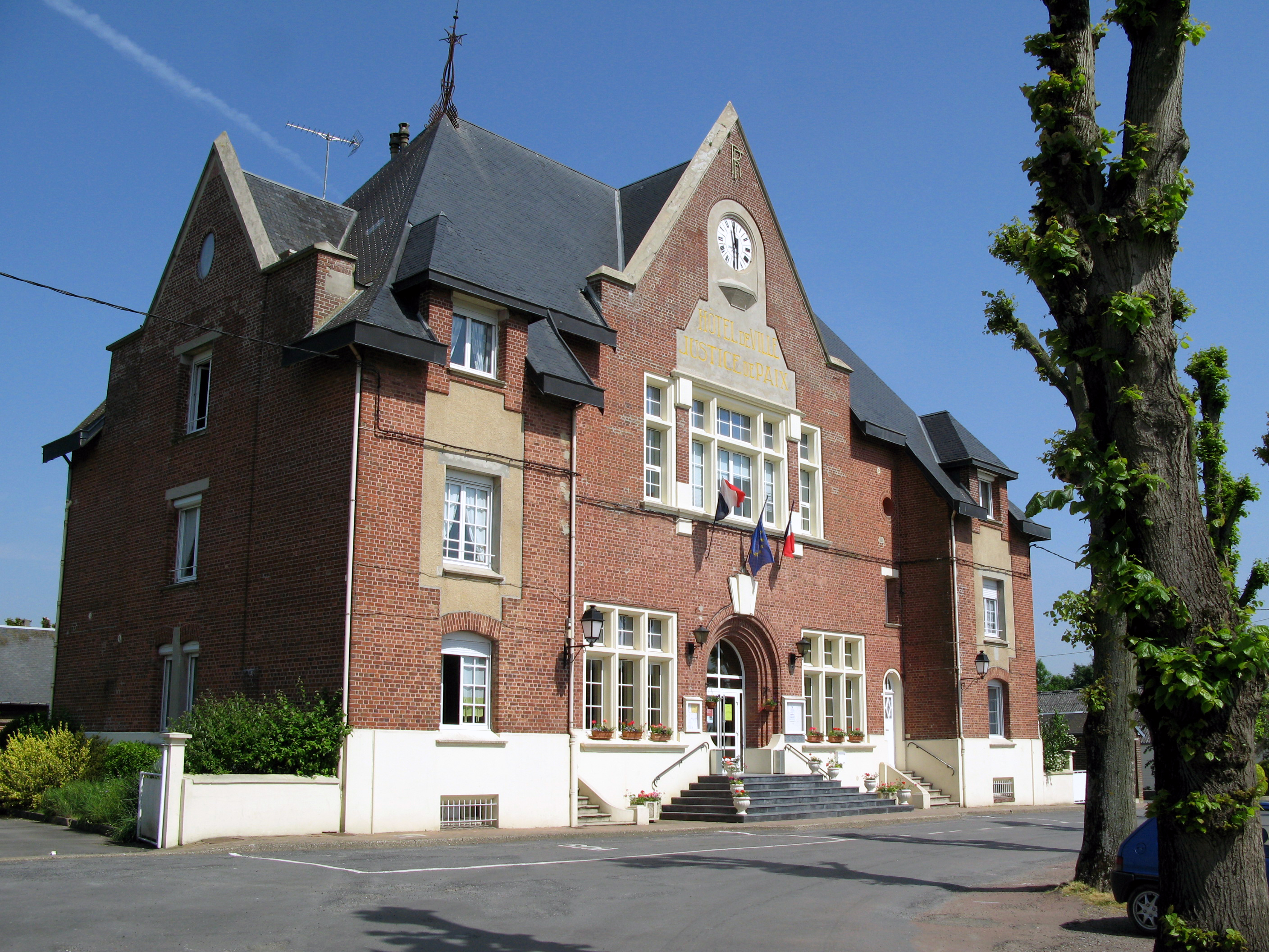 Vermand (Aisne, France) - L'hôtel-de-ville.